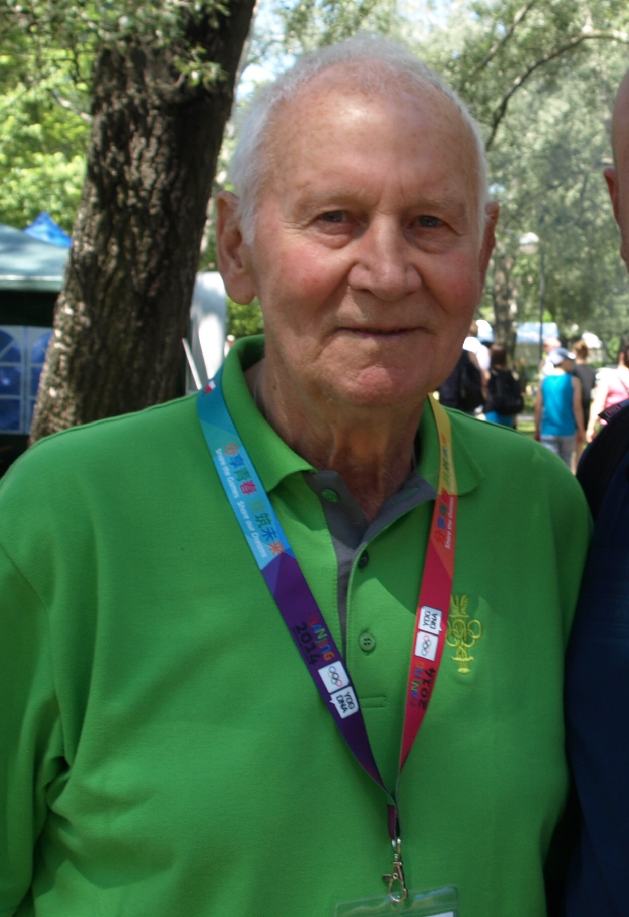 Władysław Zielinski